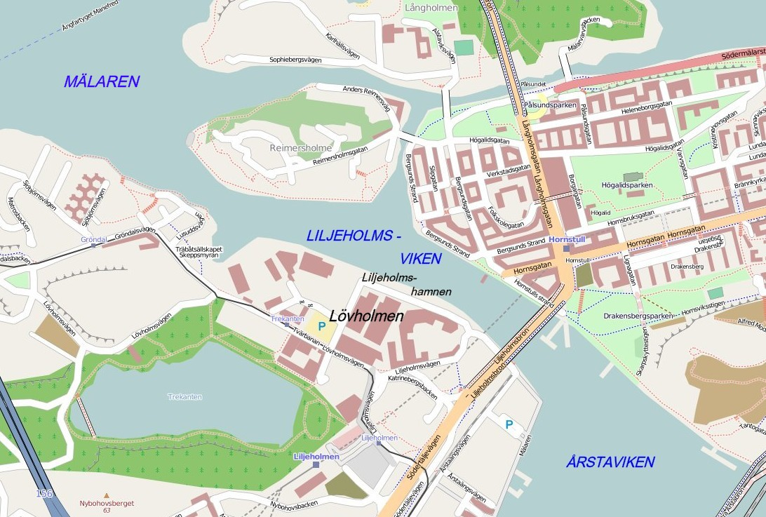 Liljeholmsviken, Liljeholmshamnen och Lövholmen i Stockholm This map may be incomplete, and may contain errors. Don't rely solely on it for navigation.